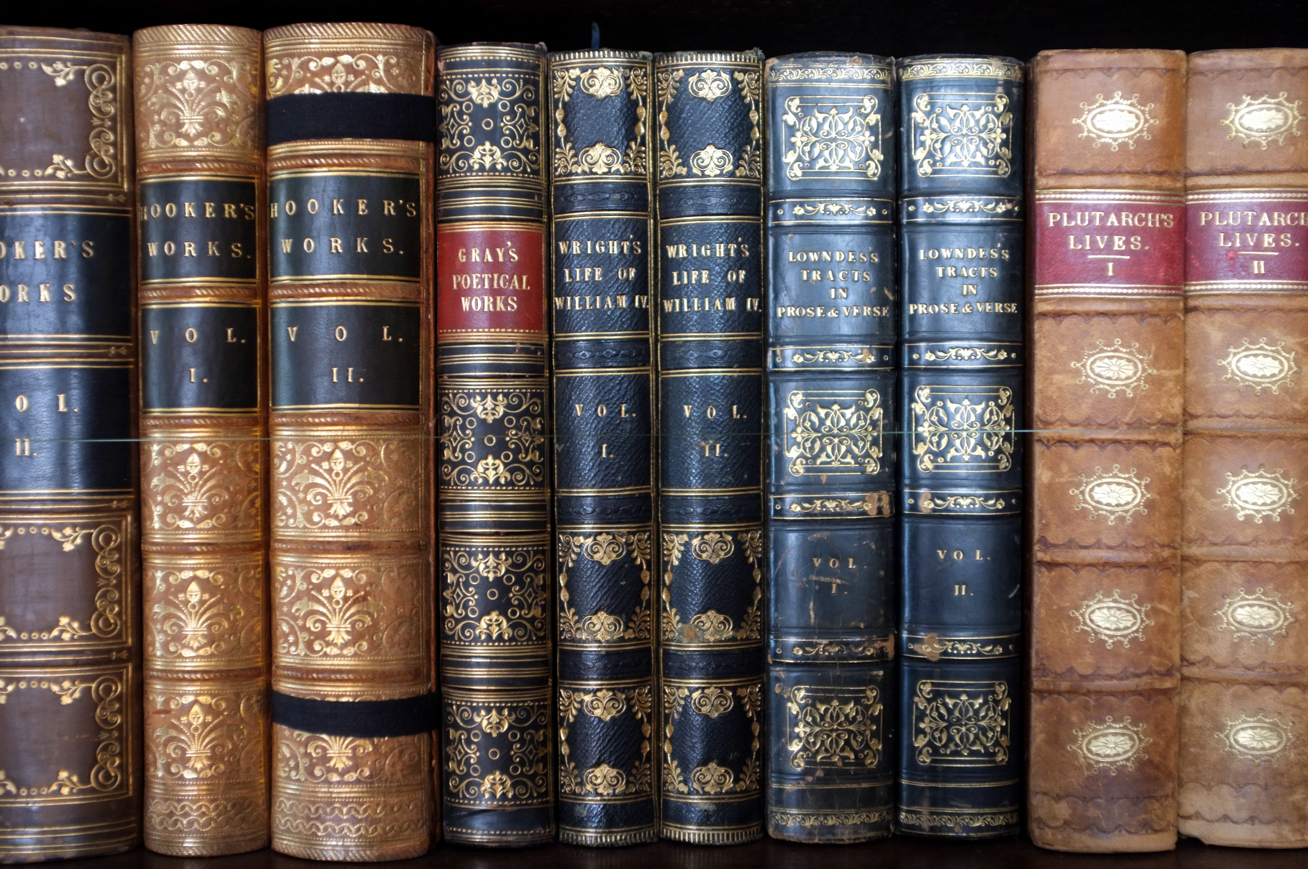 Books